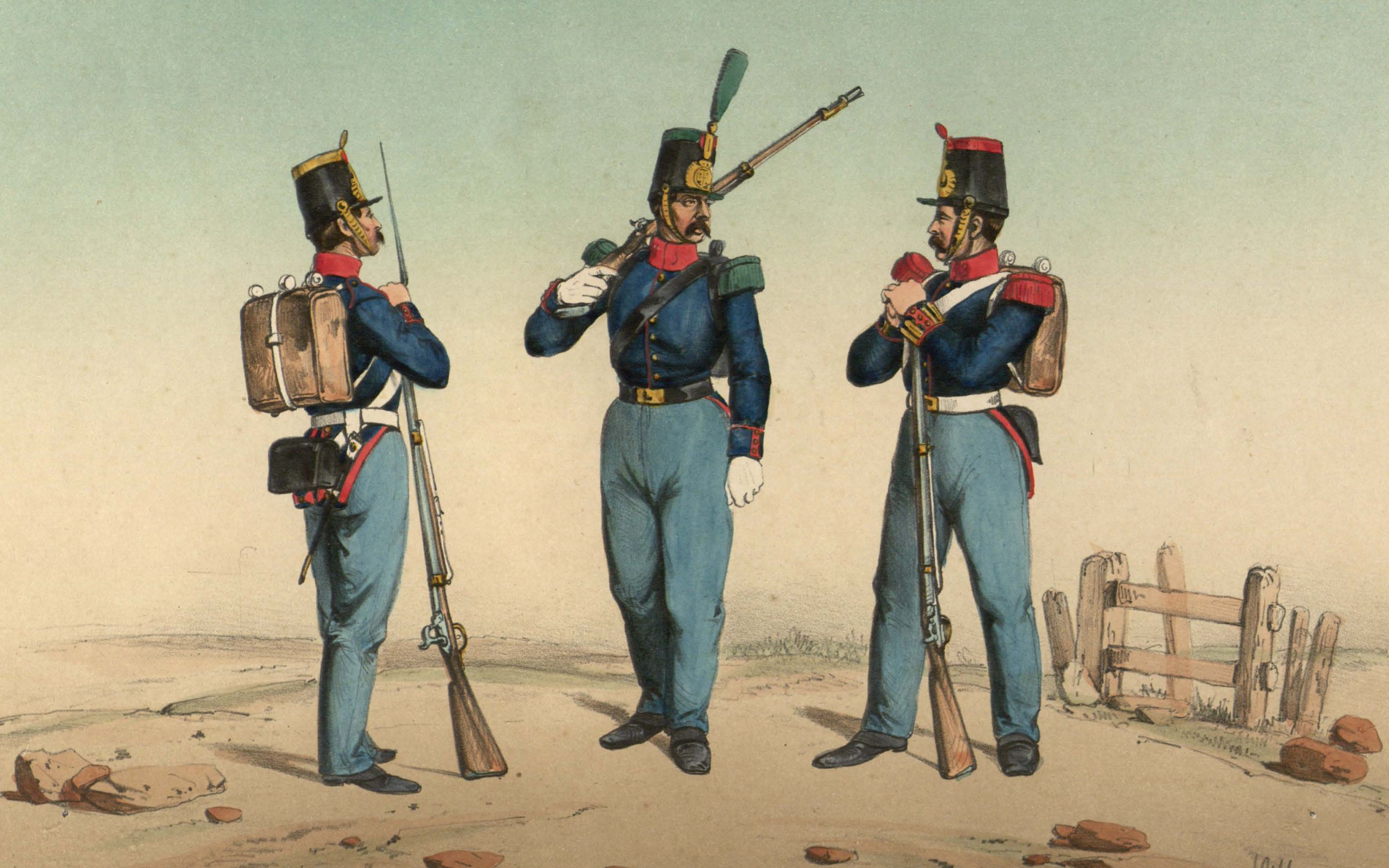 Infantería española en 1849: fusilero de infantería de linea, cazador de infantería ligera y granadero de infantería de linea.